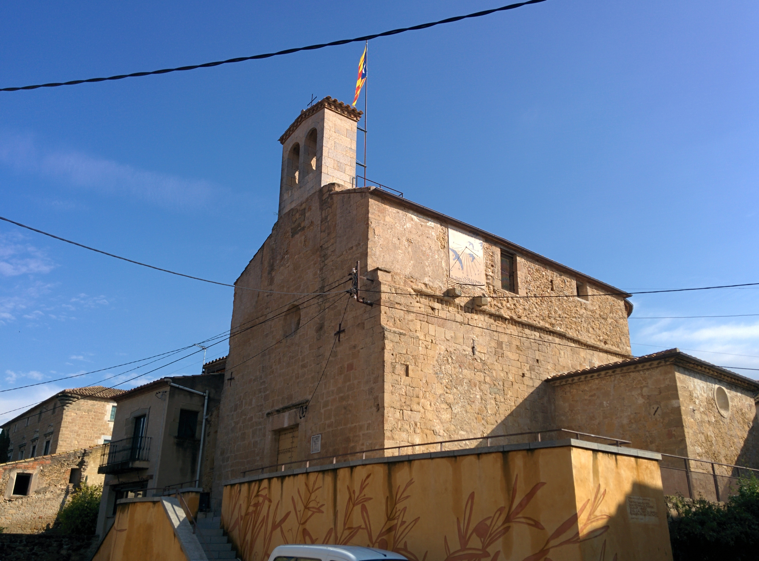 Església de Sant Genís (Bàscara)